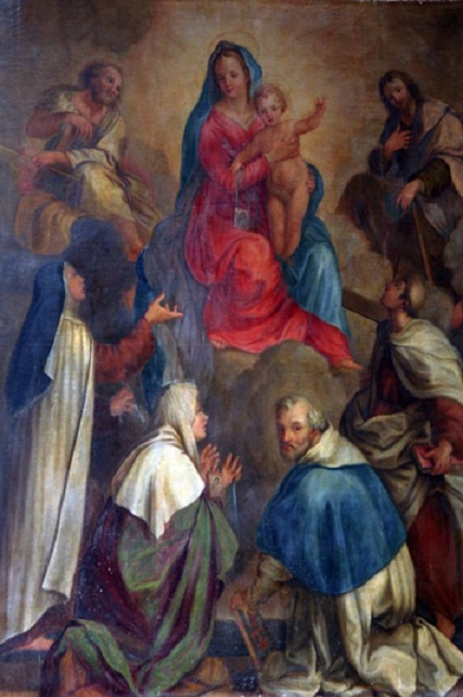 Madonna col Bambino, i profeti Elia ed Eliseo, i santi Teresa di Avila e Giovanni della Croce e due carmelitani, olio su tela, Chiesa di Santa Croce della Foce, Gubbio